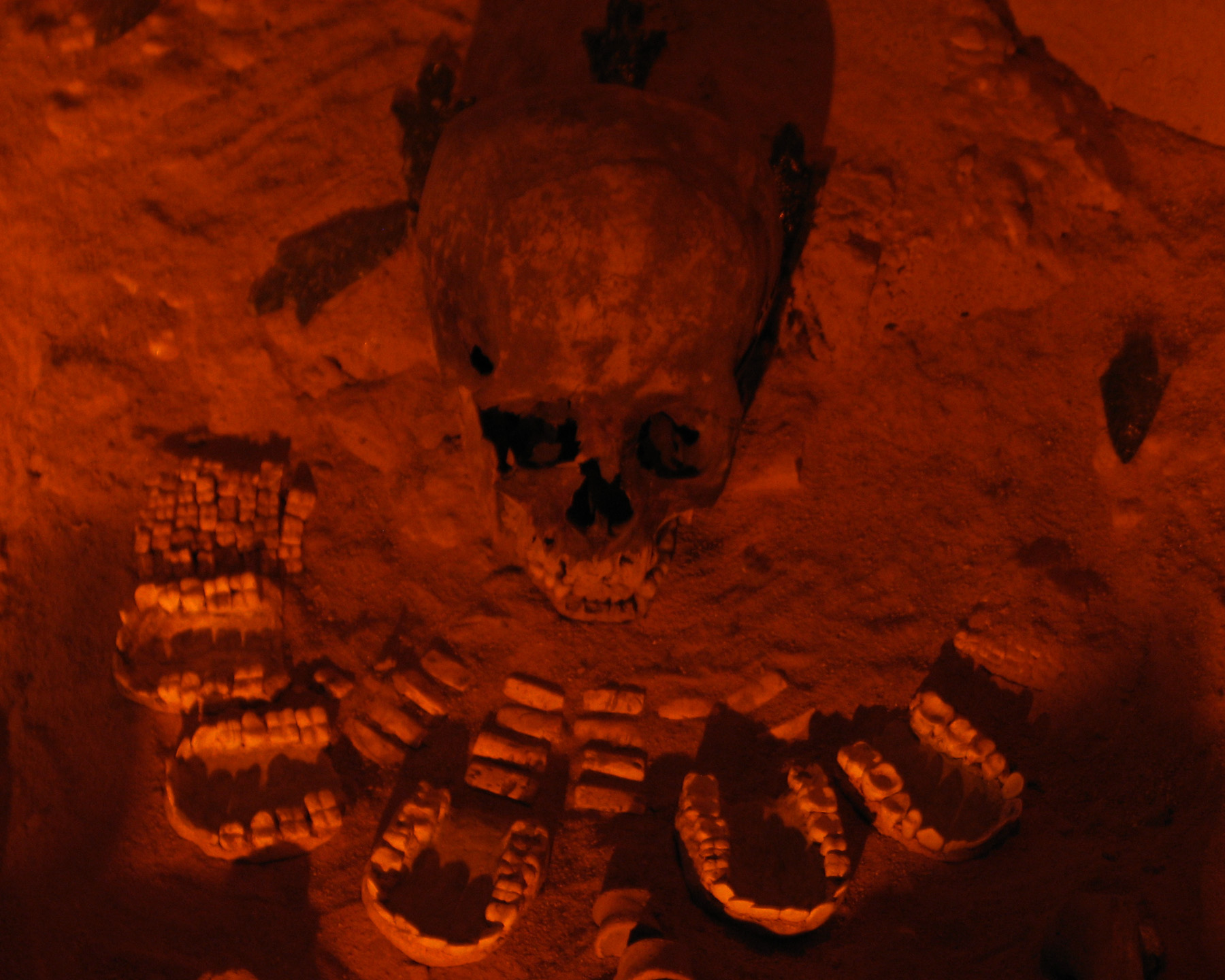 Detalle de uno de los entierros encontrados bajo la pirámide de la Serpiente Emplumada de Teotihuacan. Ha sido fechado alrededor del año 200 d. C.